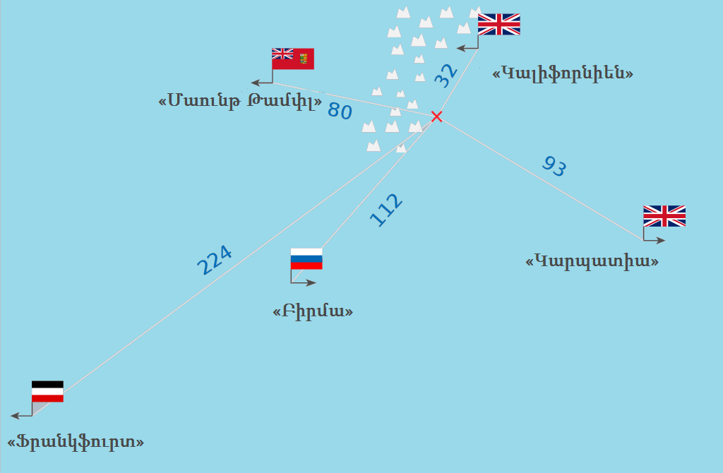 Խորտակվող «Տիտանիկ»-ի մոտակայքում գտնվող նավերը՝ նրանից մոտավոր հեռավորության մասին տվյալներով (կմ-ով)